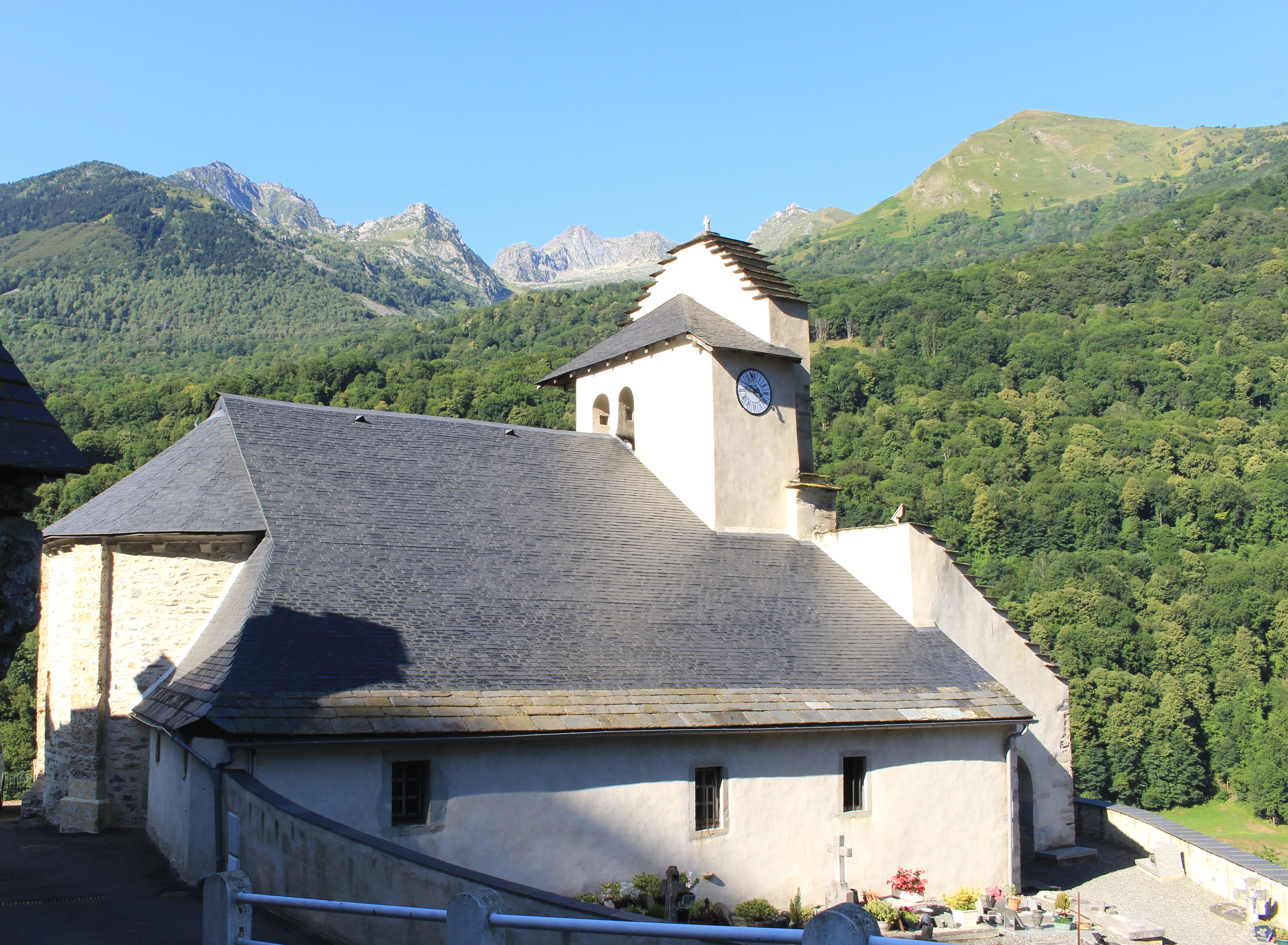 Église Saint-Pierre-et-Saint-Paul de Saligos (Hautes-Pyrénées)